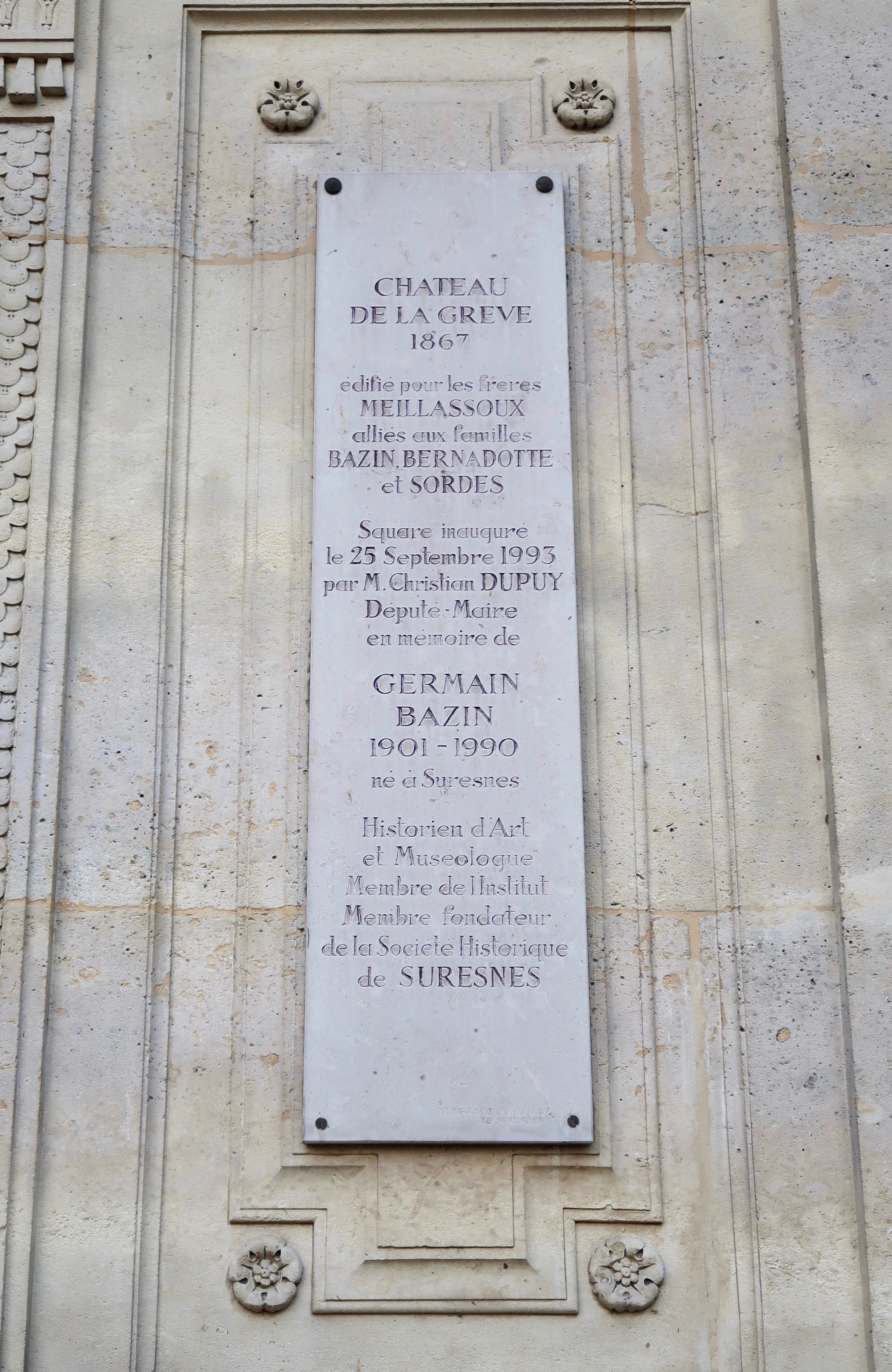 Plaque sur le château de la Grèves à Suresnes (Hauts-de-Seine).